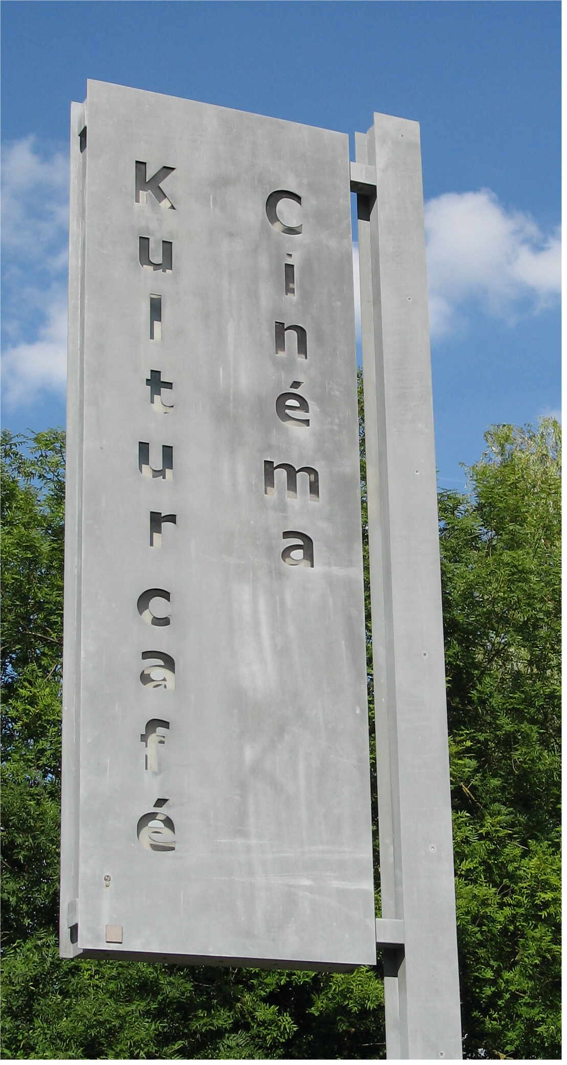 Sujet: D'Schëld virum Cinémaacher zu Gréiwemaacher. Kategorie:Lëtzebuerger Kinoen Kategorie:Gemeng Gréiwemaacher